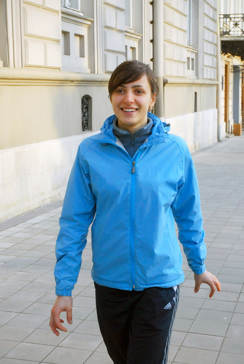 Яна Шемякіна